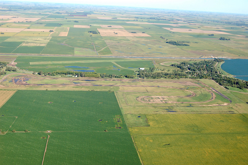 Autódromo Eusebio Marcilla de la ciudad de Junín